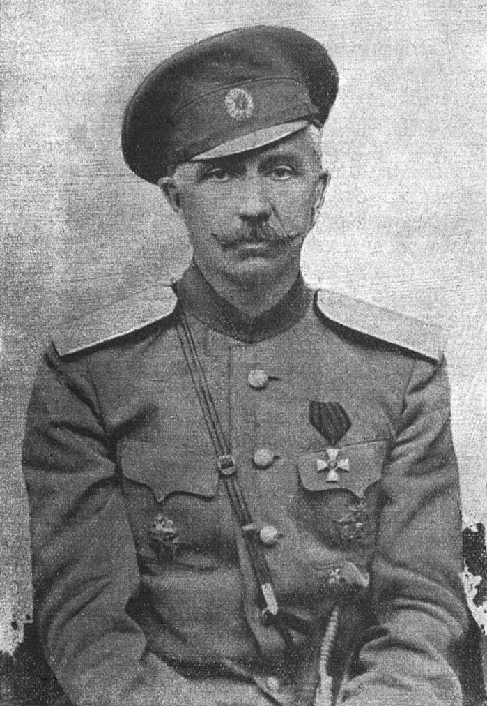 Пётр Николаевич Краснов — генерал-майор Русской императорской армии, атаман Всевеликого Войска Донского, военный и политический деятель, писатель и публицист